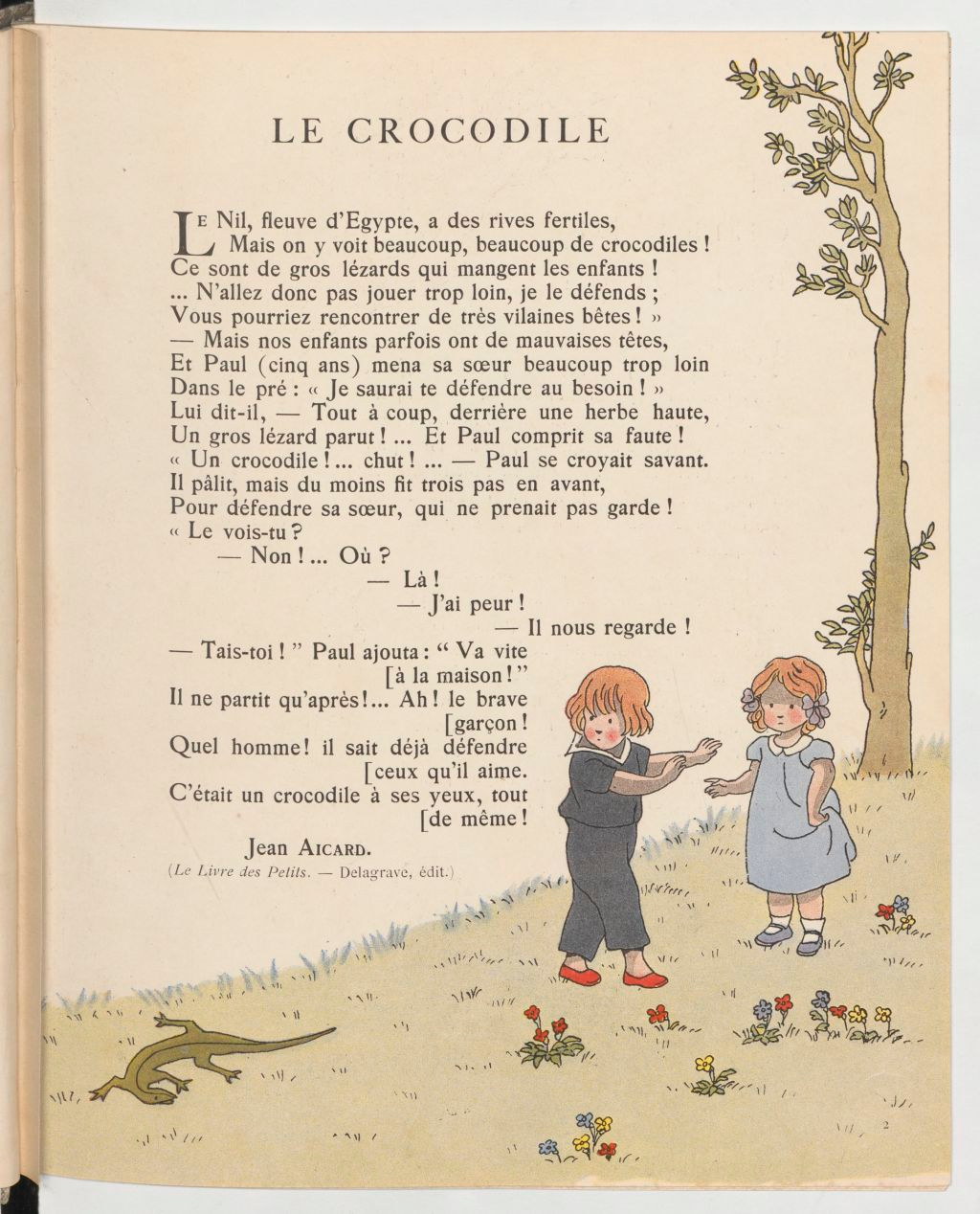 Contes et images, illustrations Marie-Madeleine Franc-Nohain : Le crocodile, Jean Aicard.